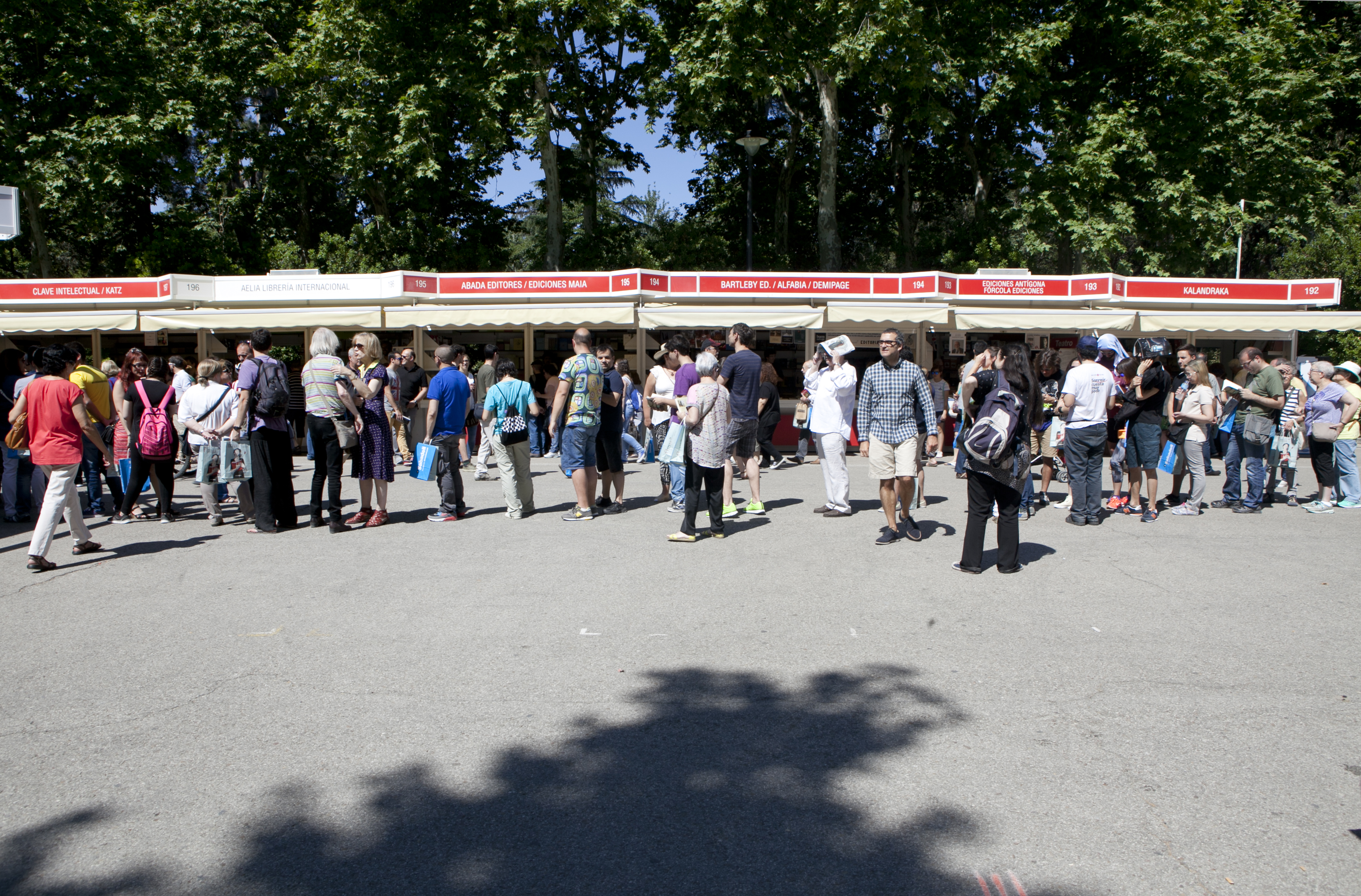 Manuela Carmena firmando su libro en la Feria del Libro de Madrid. Foto de Elvira Megías